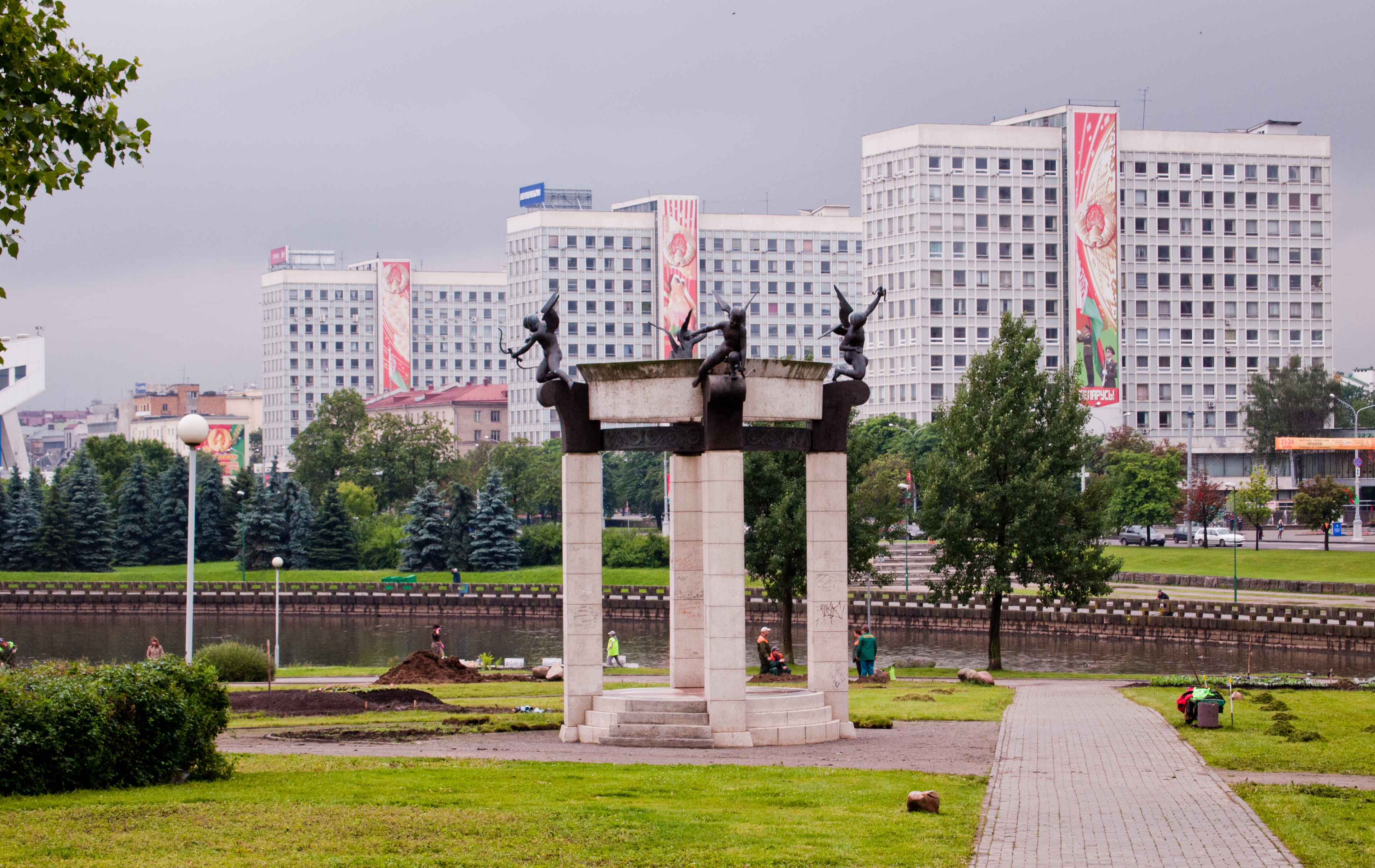 Сквер А.С. Пушкина